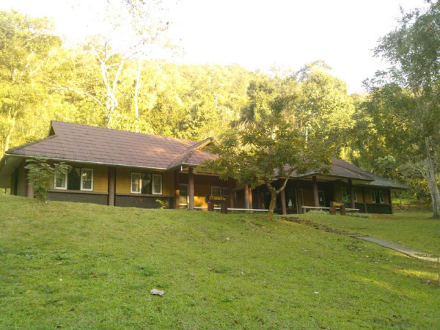 สถานที่พัก มีบ้านพักจำนวน 7 หลัง